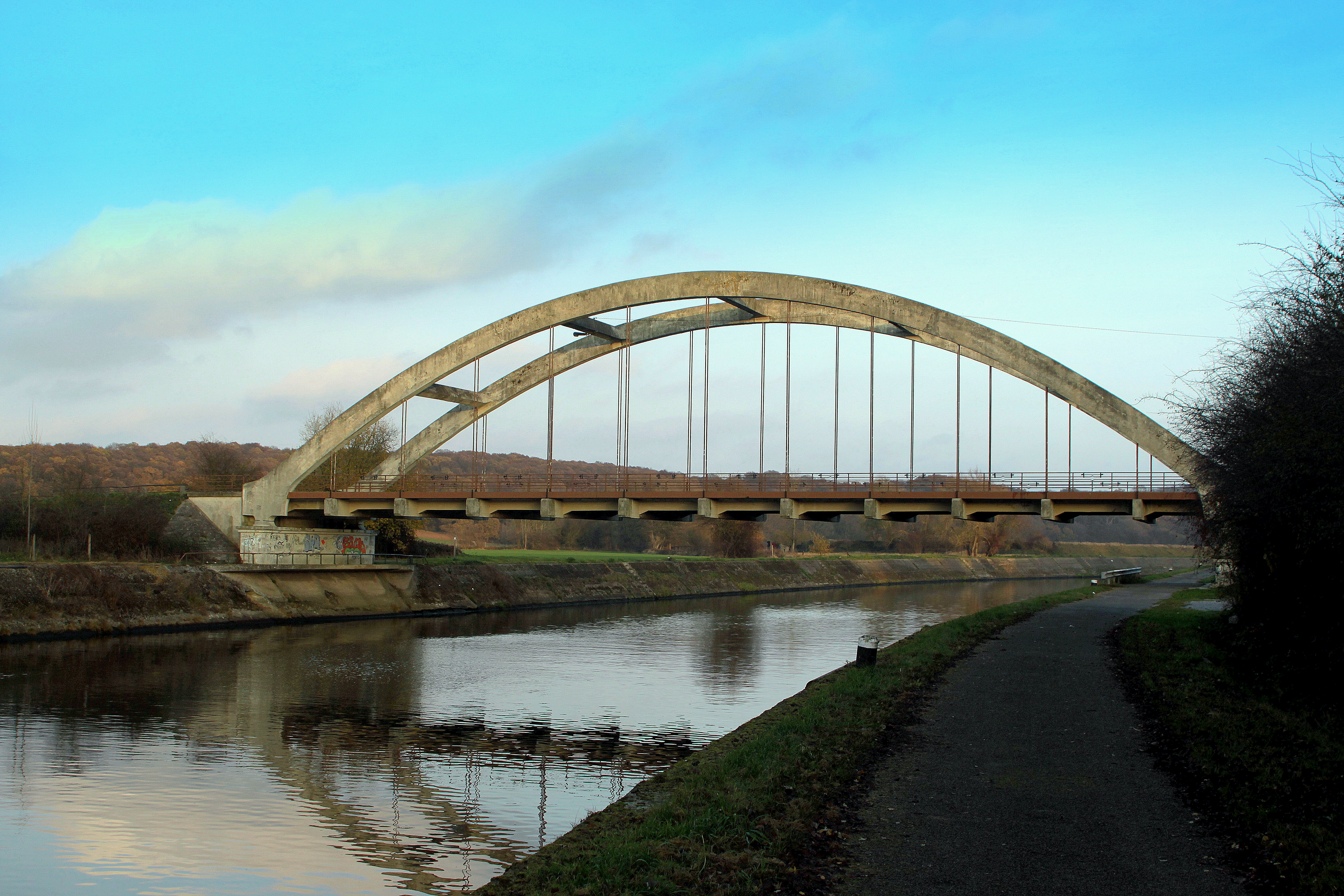 D'Sambre an d'Bréck vu Soye